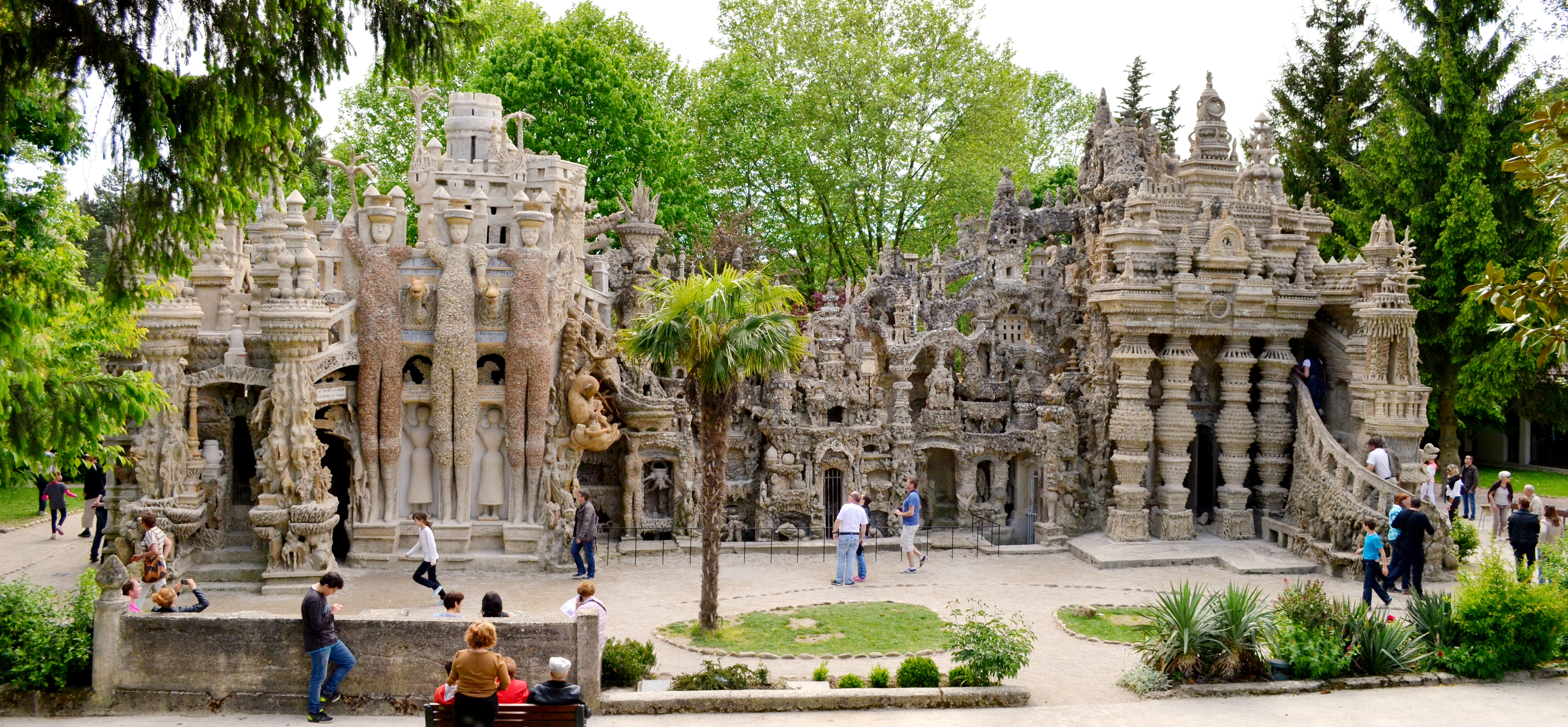 Palais idéal du facteur Cheval, côté Est. This building is en partie classé, en partie inscrit au titre des Monuments Historiques. .